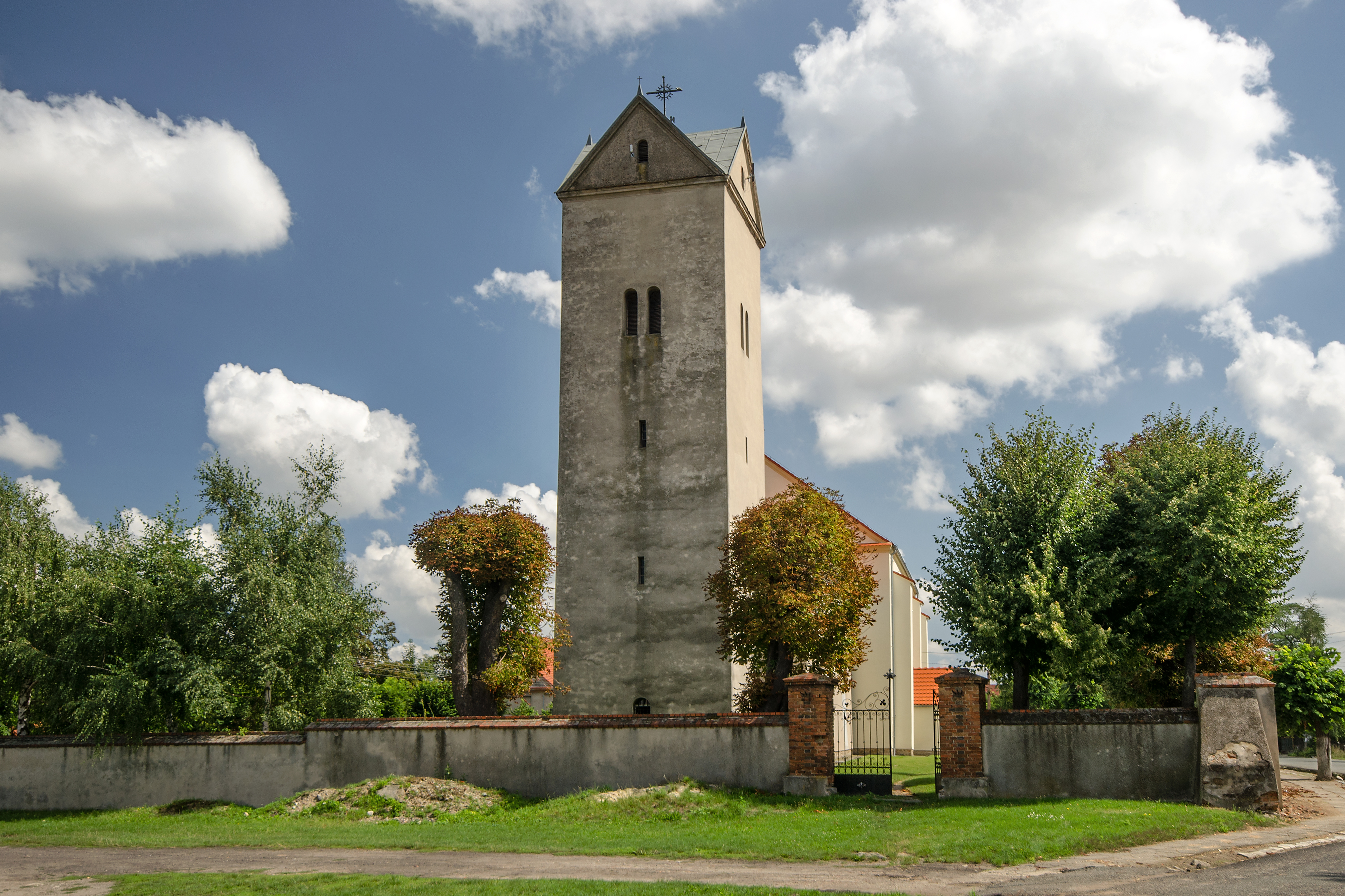 Jutrzyna, kościół par. p.w. św. Franciszka, XIII, XVI, XIX